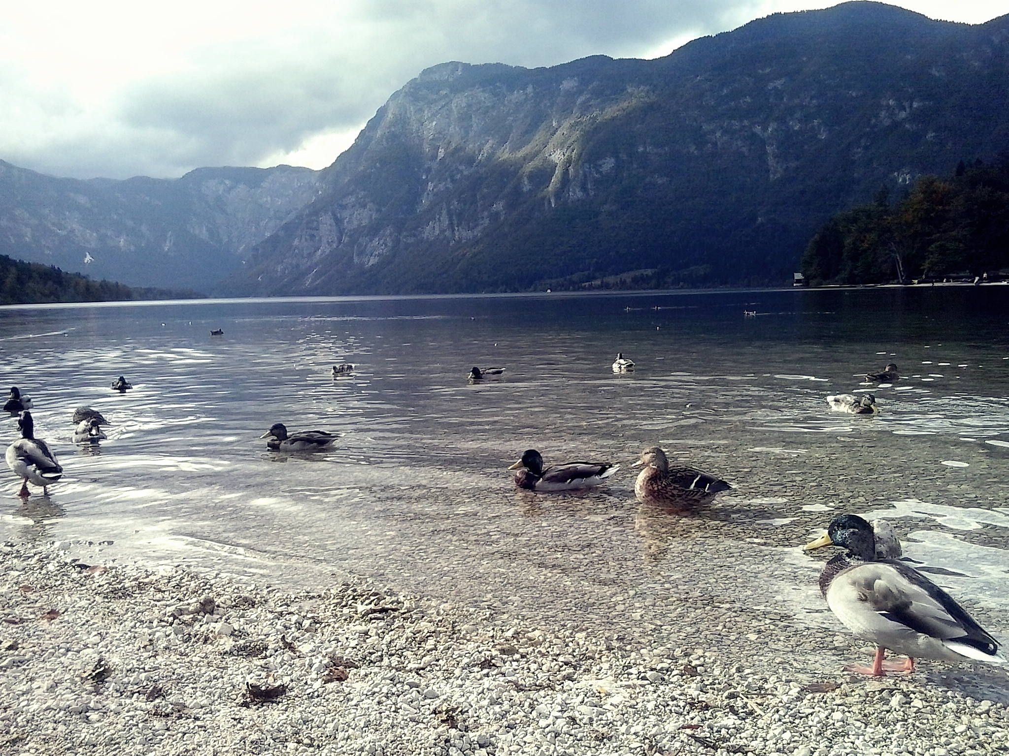 Lago Bohinij, Eslovenia